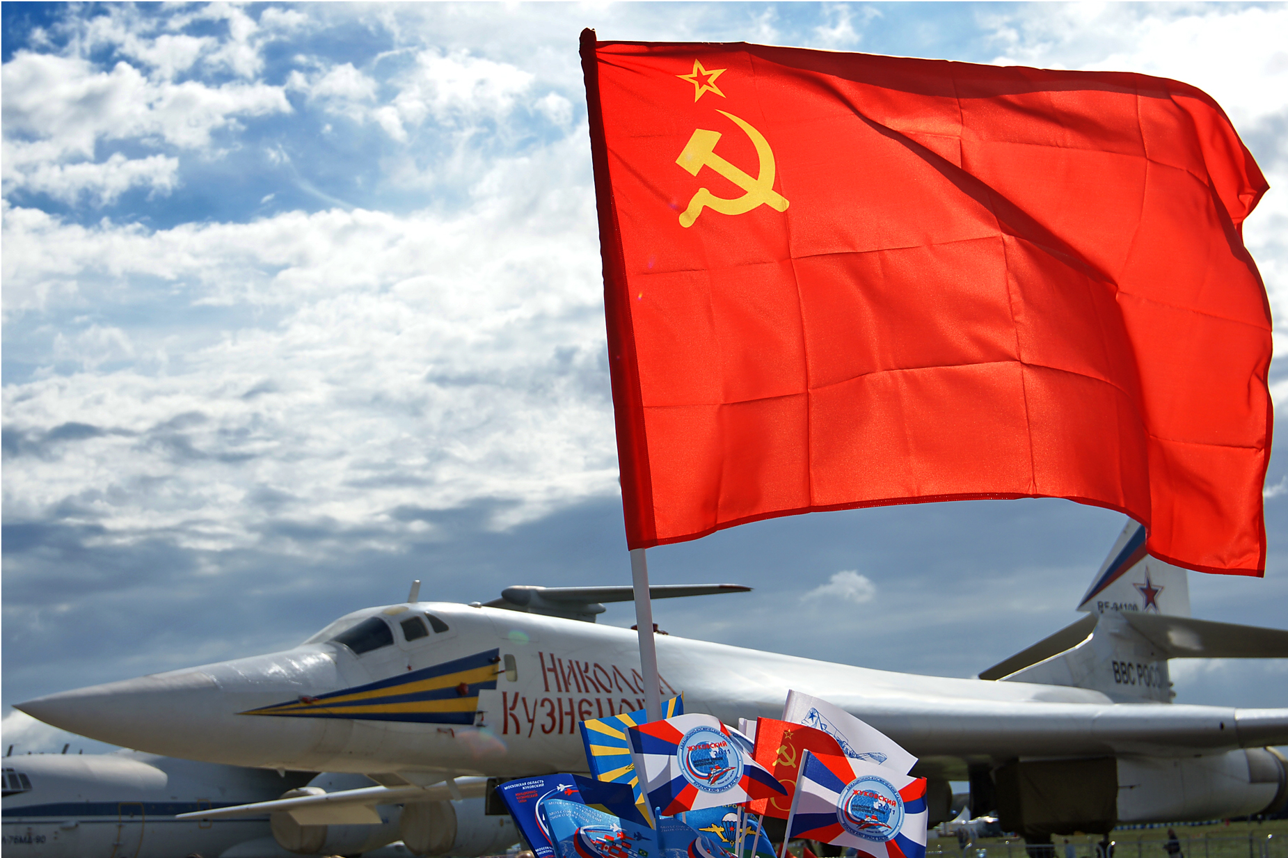 Russian Power